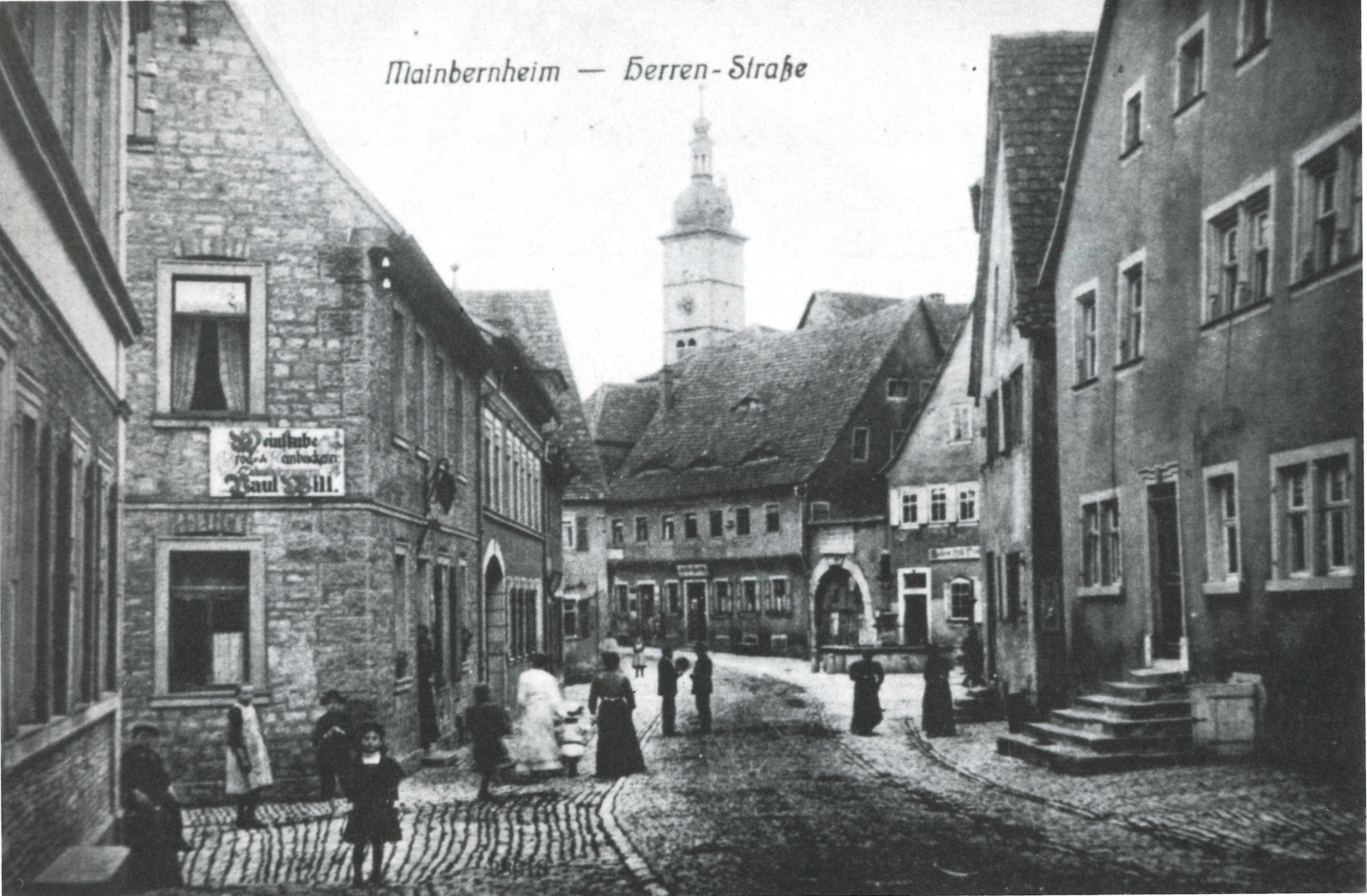 Fotografie Mainbernheim: Herrnstraße Mainbernheim, Blick auf die Evangelische Kirche um 1900.